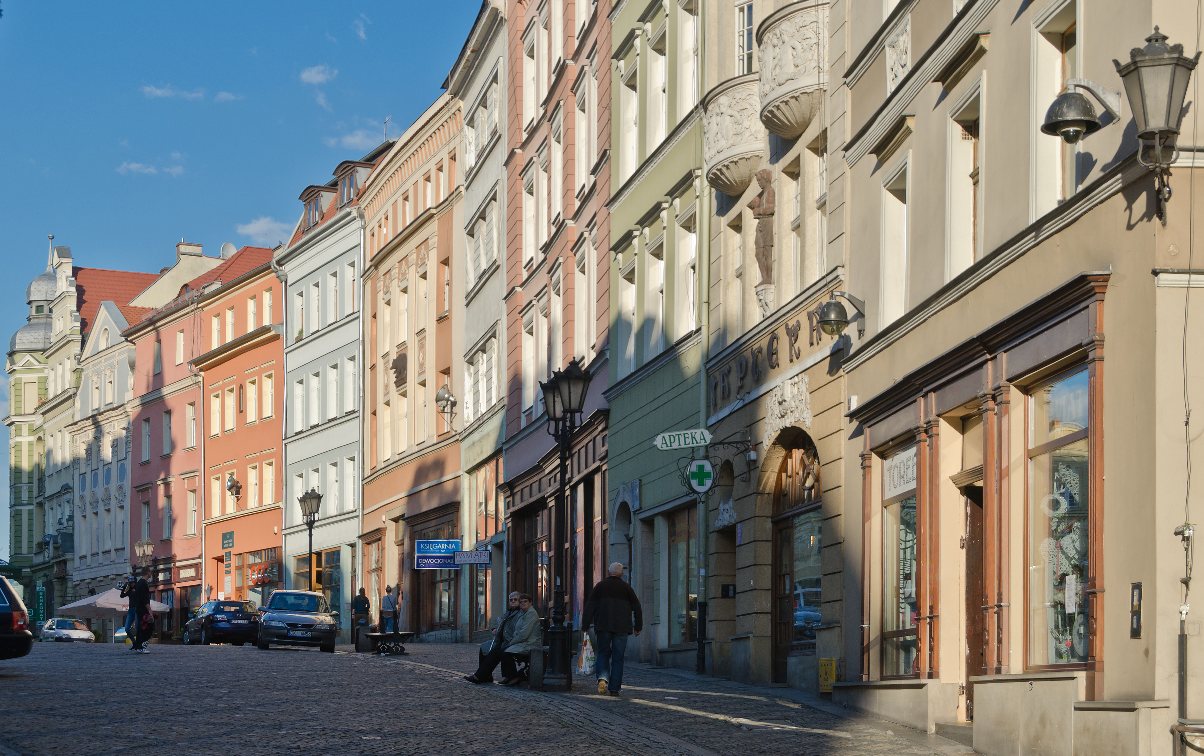 Kłodzko, historyczny układ urbanistyczny - ośrodek historyczny miasta Kłodzko z zachowanymi niekompletnie miejskimi murami obronnymi wraz ze średniowiecznym mostem i wyspą Piasek